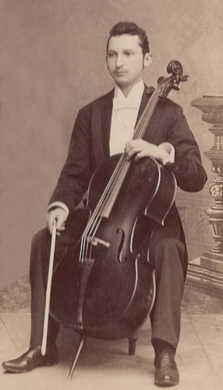 Otto Berger, český violoncellista, člen Českého kvarteta a hudební pedagog